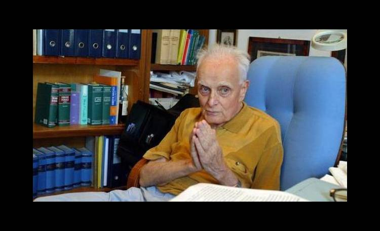 Giuseppe Abbamonte